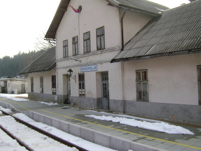 Kolodvor Rudopolje na Ličkoj pruzi